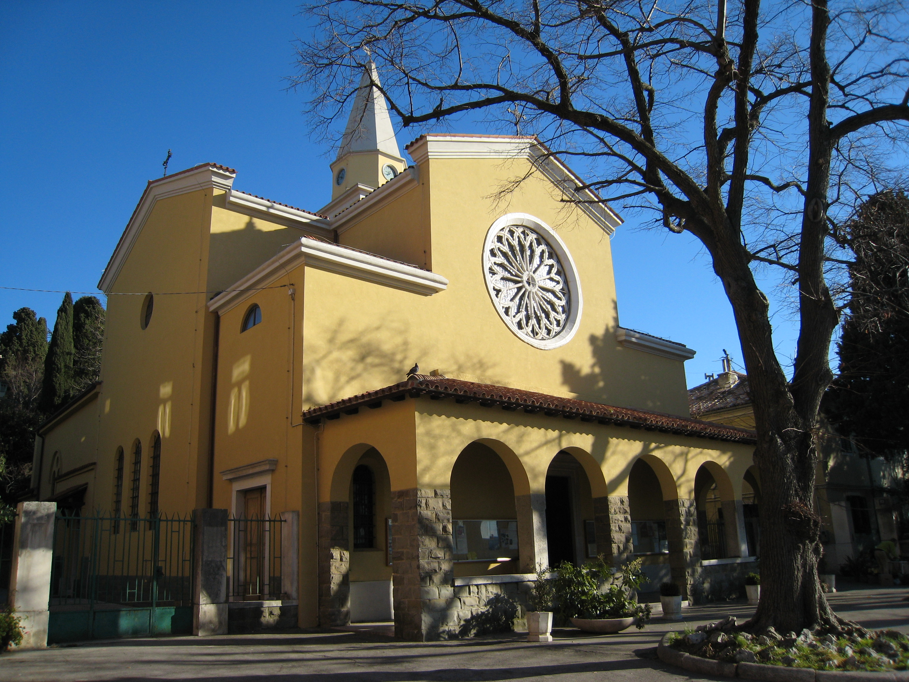 LBarcola, frazione di Trieste: la chiesa parrocchiale di San Bartolomeo Apostolo. Dicembre 2007